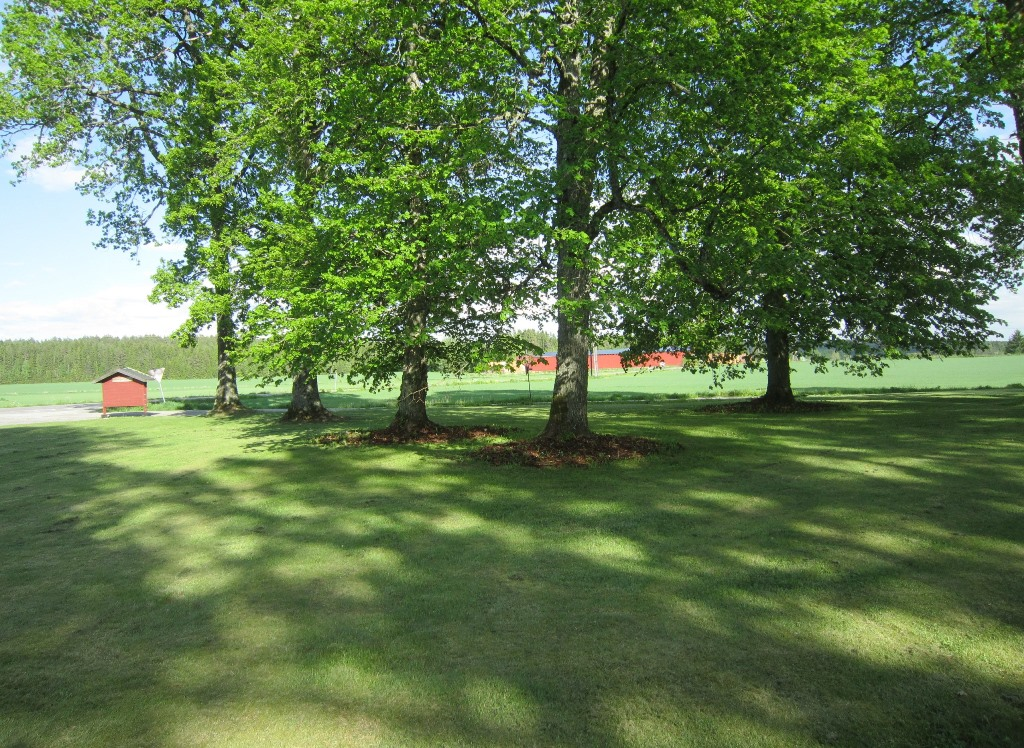 Hemnes gamle kirkegård, tidligere kirkested for Søndre Høland kirke